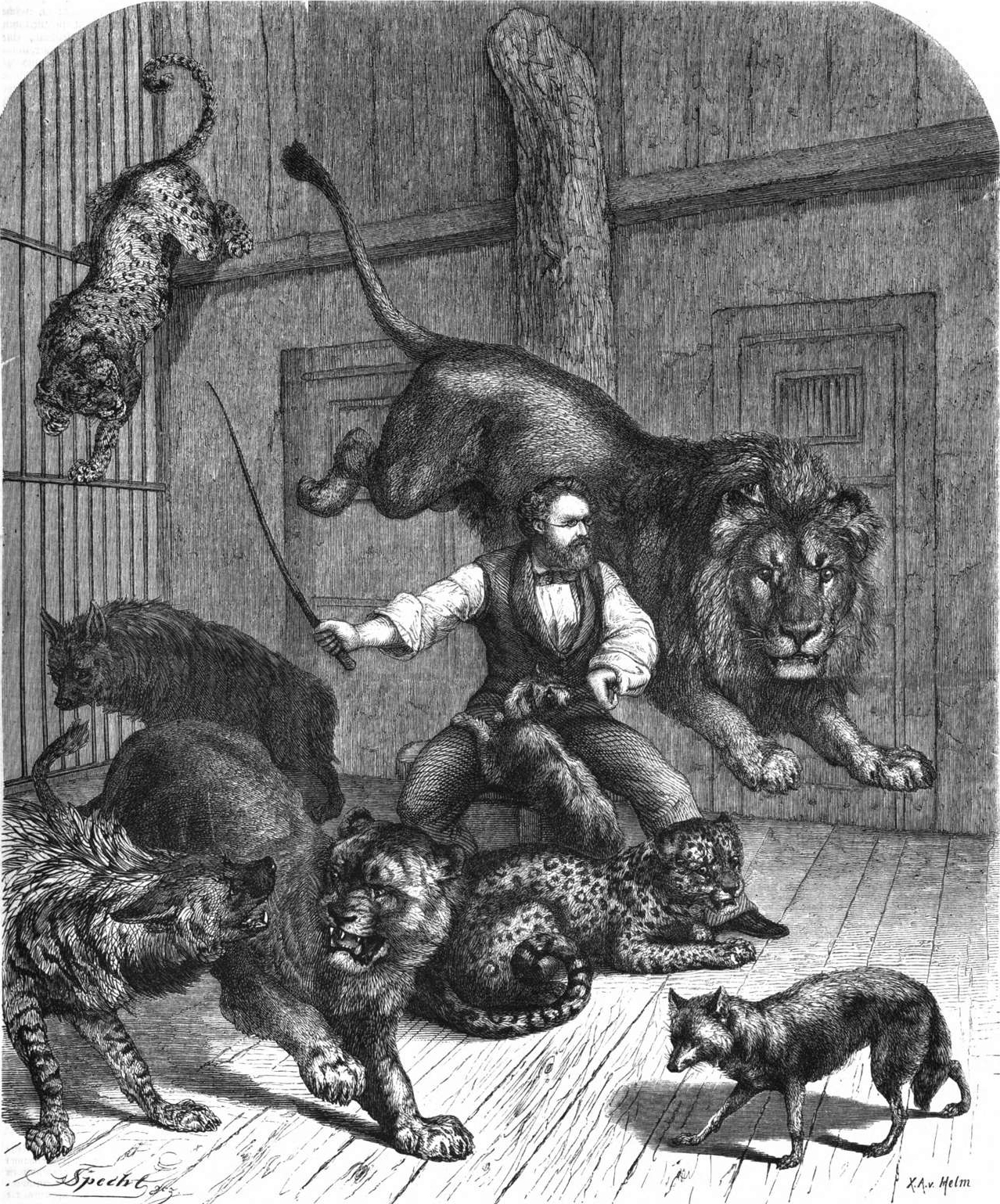 Specht: Der zoologische Garten in Stuttgart. Gustav Werner im Löwenkäfig, Zeichnung, 1864 oder früher.